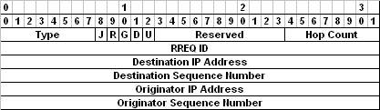 Message du protocole AODV